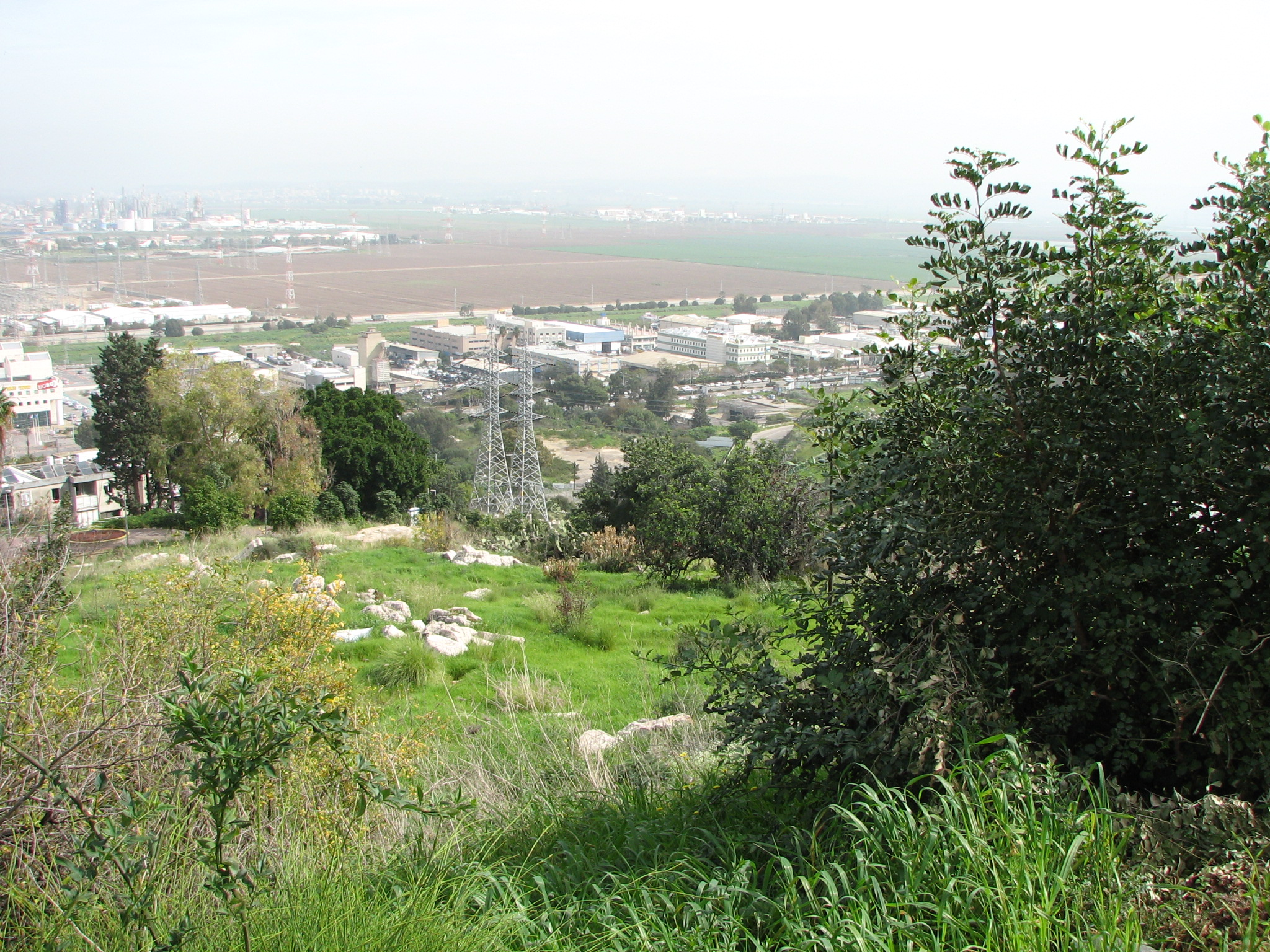 Ben Dor – Suburb in the city Nesher, Israel שכונת בן דור בעיר נשר ליד חיפה